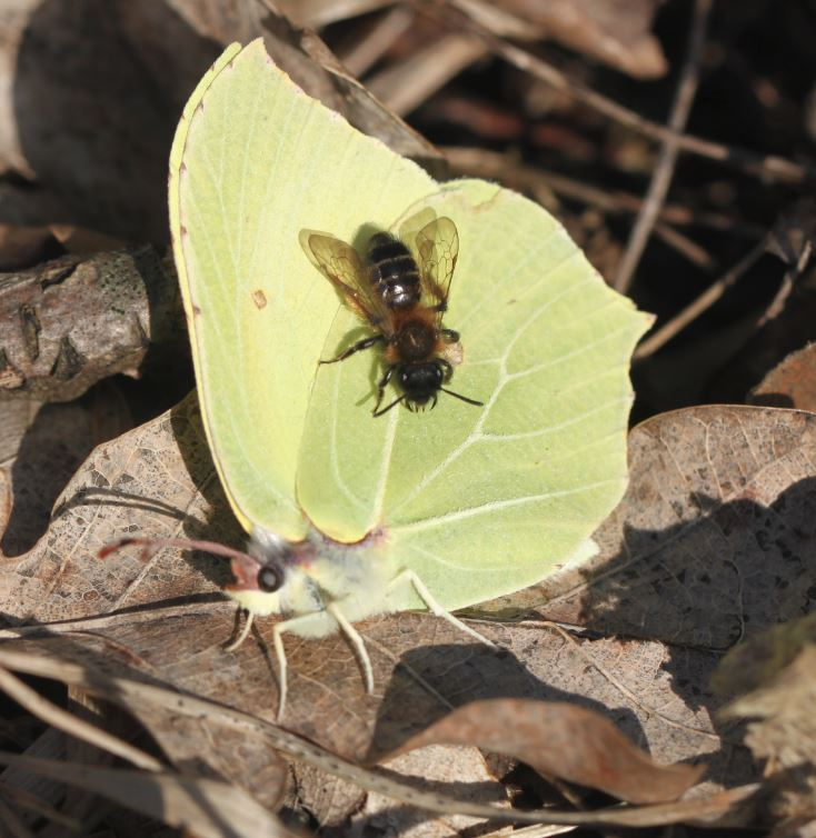 Eine Biene verwechselt im Frühjahr einen Zitronenfalter mit einer Blüte; in der Schwetzinger Hardt